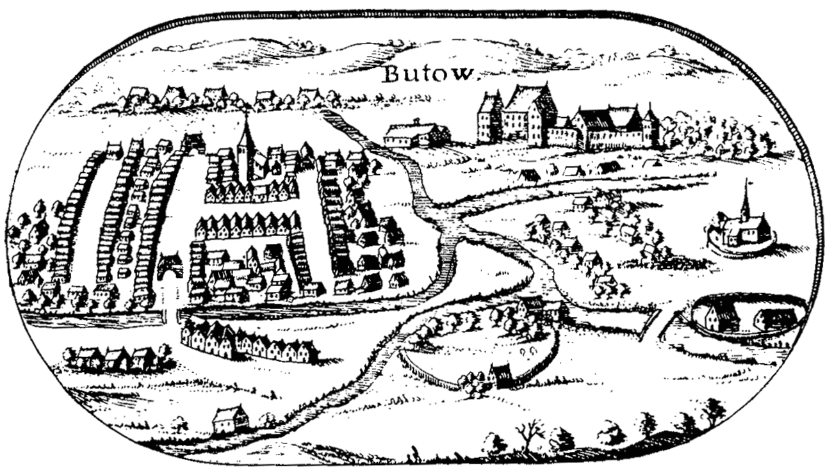 Kaszëbsczi: Dôwné Bëtowò. Céchùnk Lubinusa z 1618 rokù. Kategòrëjô:Lopczi w pùbliczny domenie